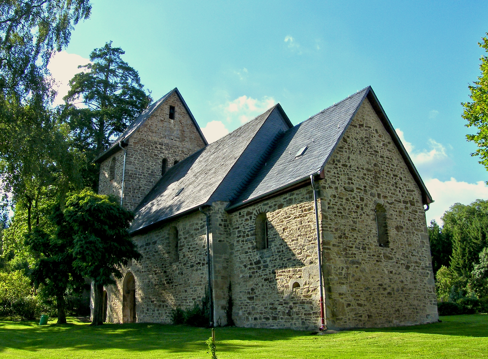 Romanische Kirche Korbach Rhena, Hessen, Deutschland